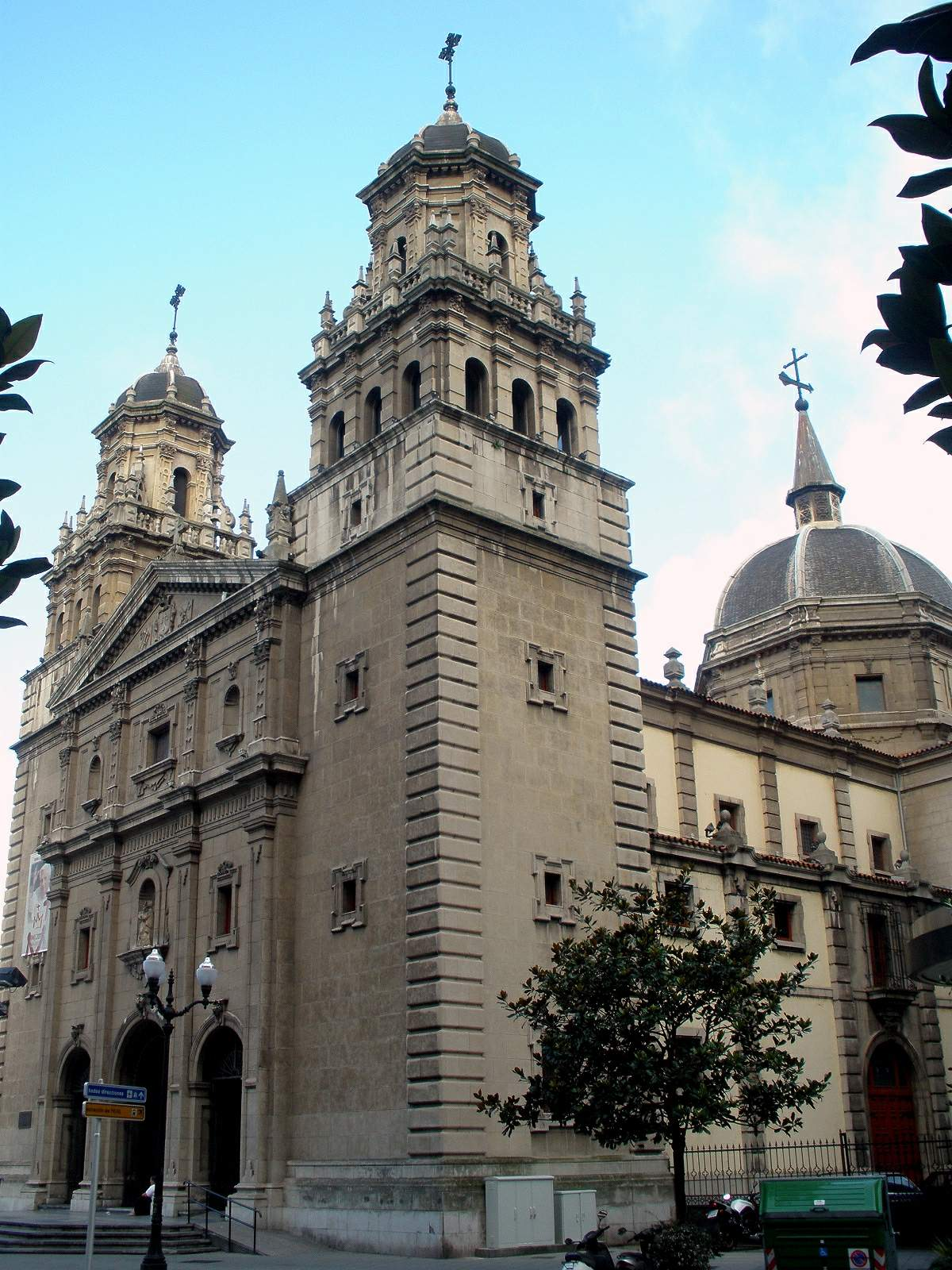 Church of San José, Gijón